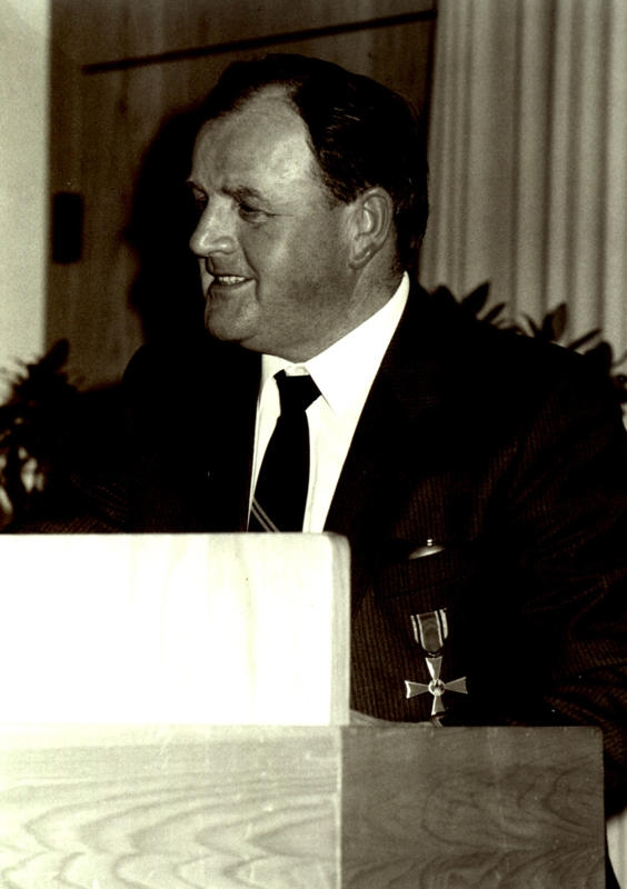 Friedrich Wilhelm Schnitzler 1986 Bundesverdienstkreuz der BRD